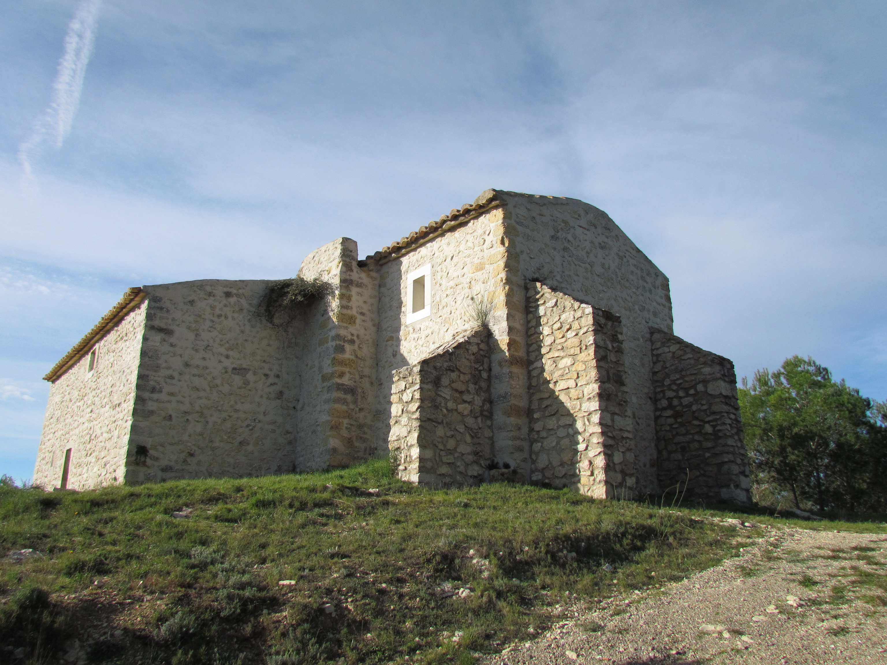 Absis i casa de l'ermità de Sant Cristòfol de Sant Mateu (Baix Maestrat)